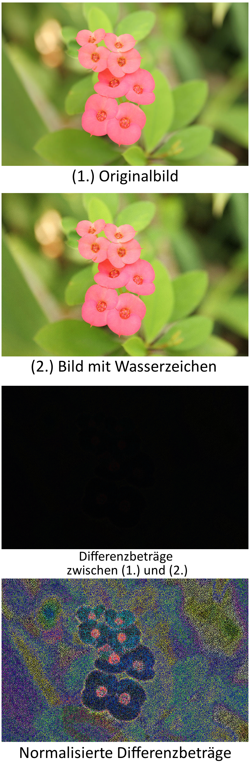 Schrittweise Visualisierung eines digitalen Wasserzeichens: Bild ohne Wasserzeichen (Quelle: File:Flower public domain dedication.jpg) Bild mit Wasserzeichen (generiert mit Digimarc → weitere Informationen) Bild, enthält die Differenzbeträge zwischen den Bildern. Da sie nahe Null sind, ist das Bild scheinbar schwarz. Bild, zeigt eine normalisierte Version des dritten Bildes, d.h. die Werte sind pro Farbkanal auf den Wertebereich 0-255 aufgespreizt.